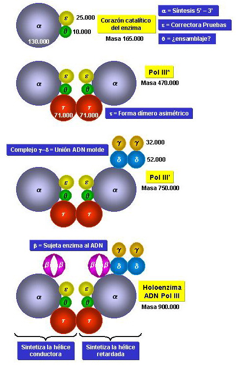 composición del Holoenzima Pol III de E. coli